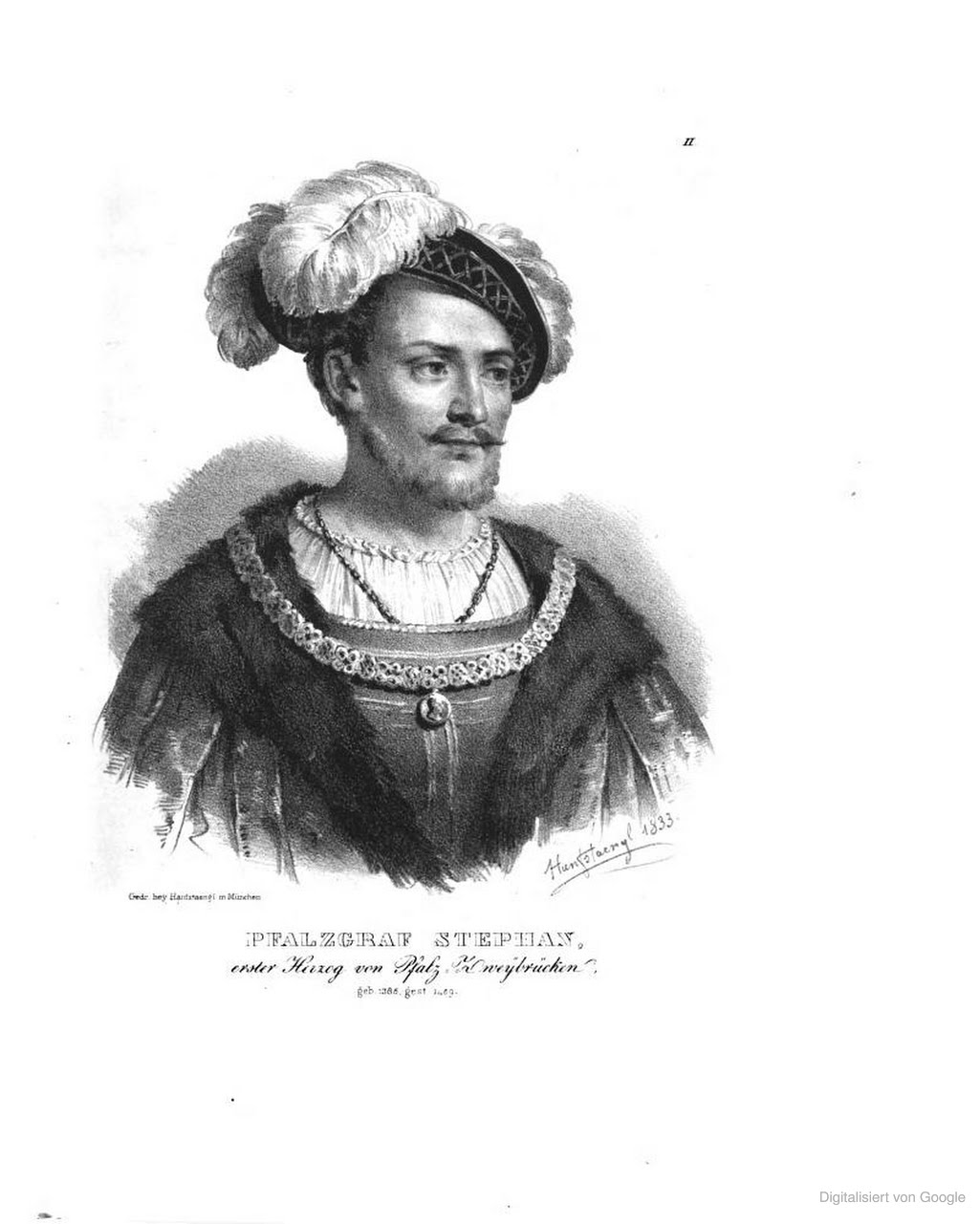 Stefan von Pfalz-Simmern-Zweibrücken (* 23. Juni 1385; † 14. Februar 1459 in Simmern)